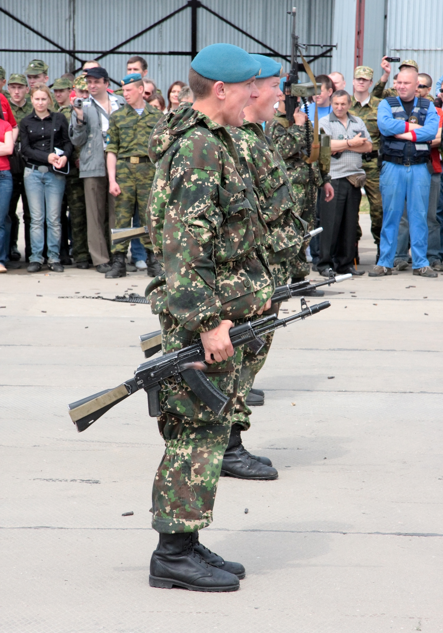 МАФ "Крылья Победы" в Кубинке - Показательное выступление ВДВ